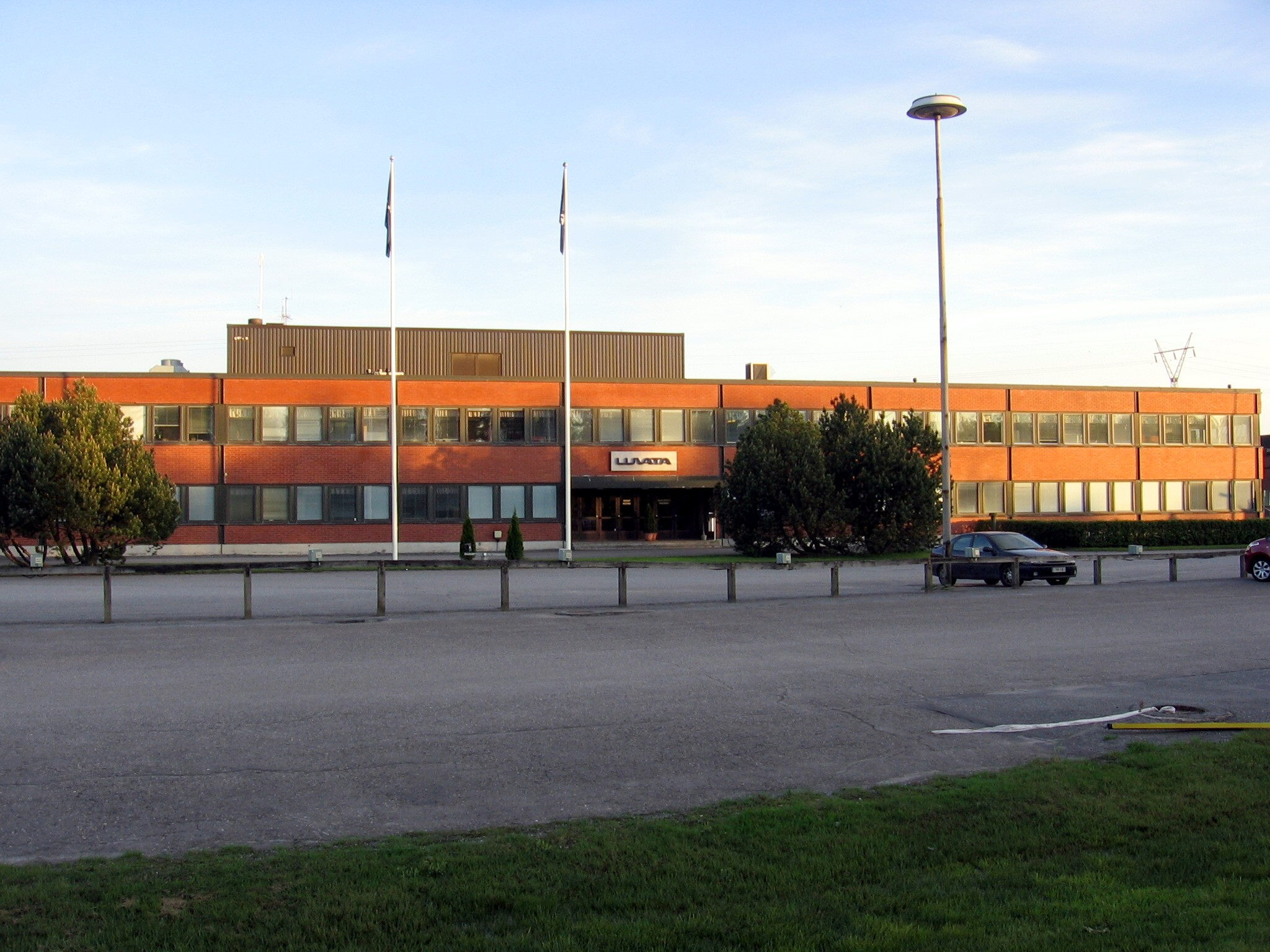 Luvata (Pori)